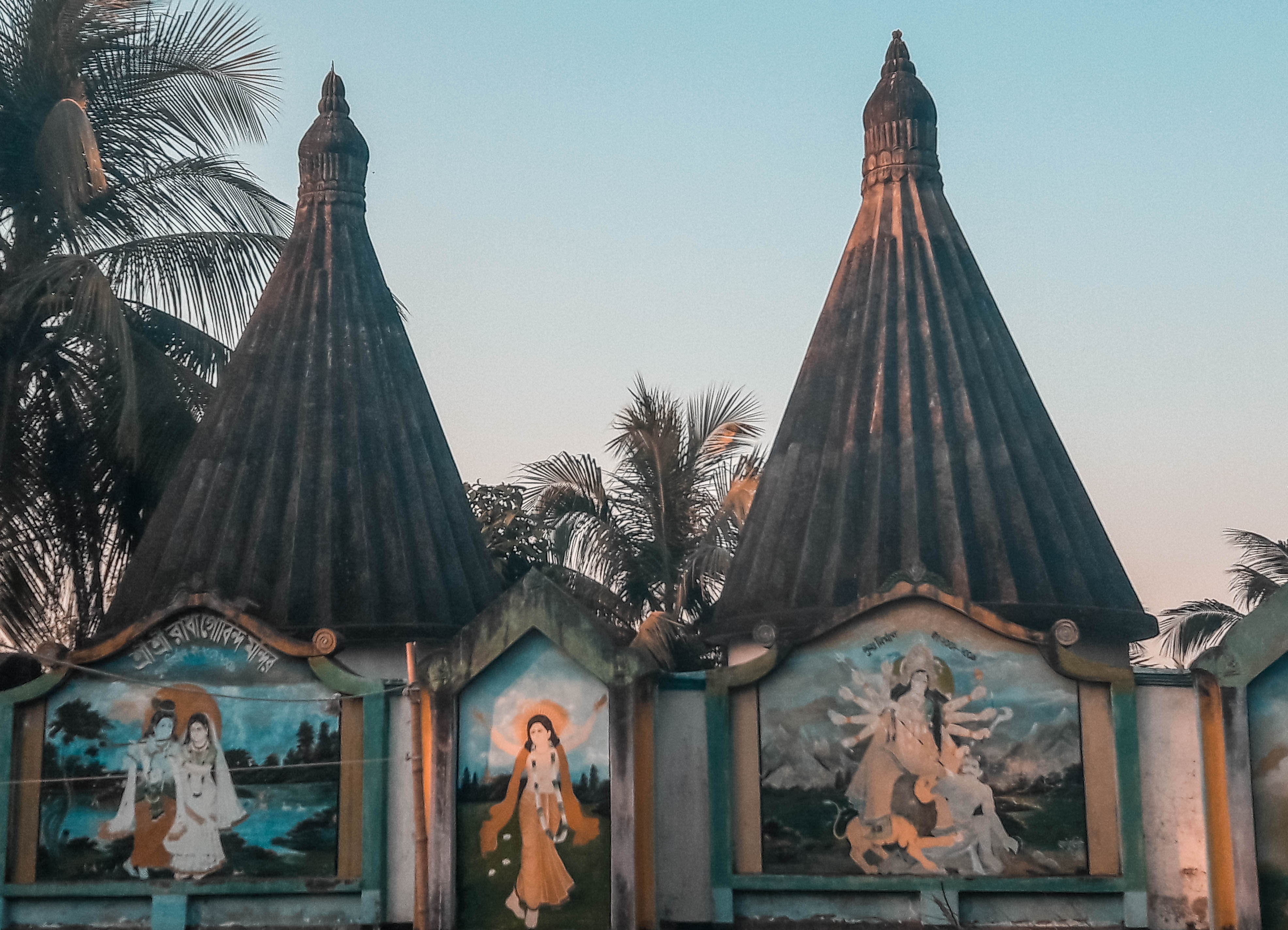 ছয়ঘরিয়া জোড়াশিব মন্দির